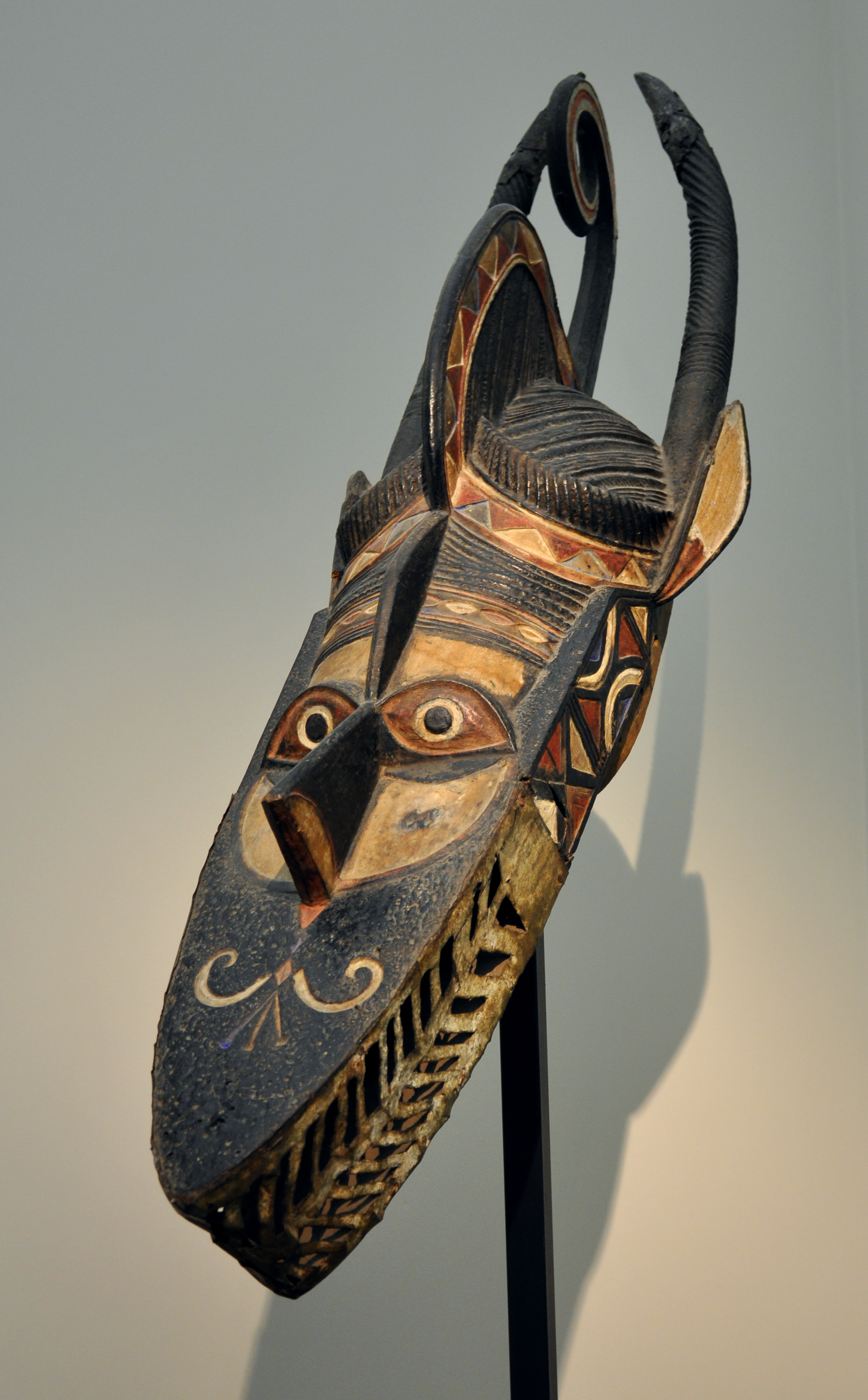 Maske, Nalu-Meister von Kukuba, Guinea, frühes 20. Jh.; Holz (bemalt), Metall Museum Rietberg, Zürich; Inv. Nr. RAF 12